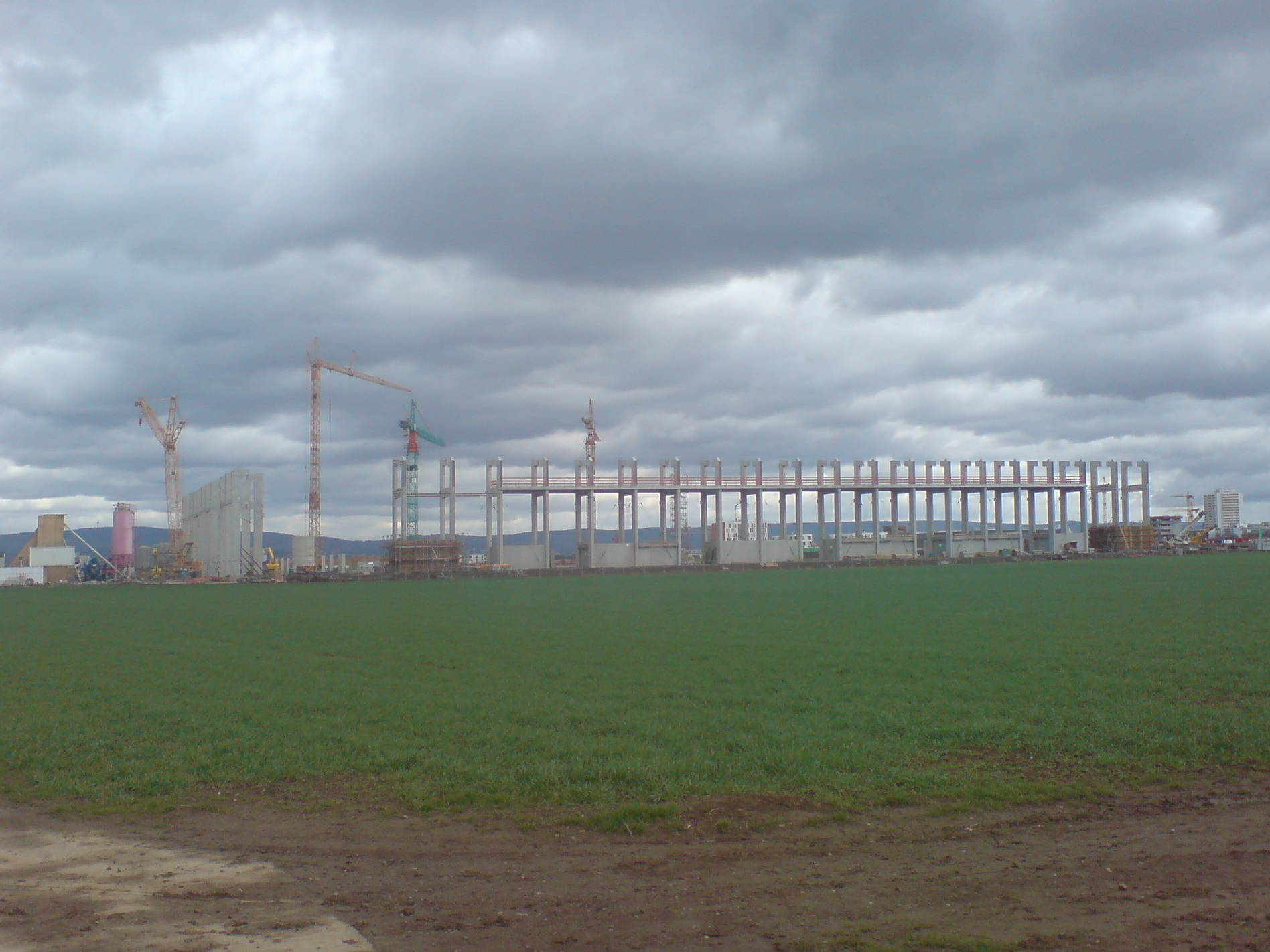 Die im Bau befindliche Coface Arena im April 2010